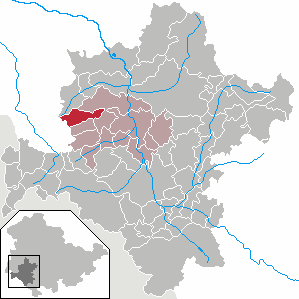 Hümpfershausen in Thuringia - District Schmalkalden-Meiningen